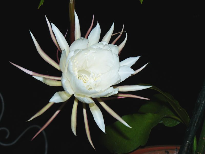 Fleur de lune, 21h52, presque ouverte